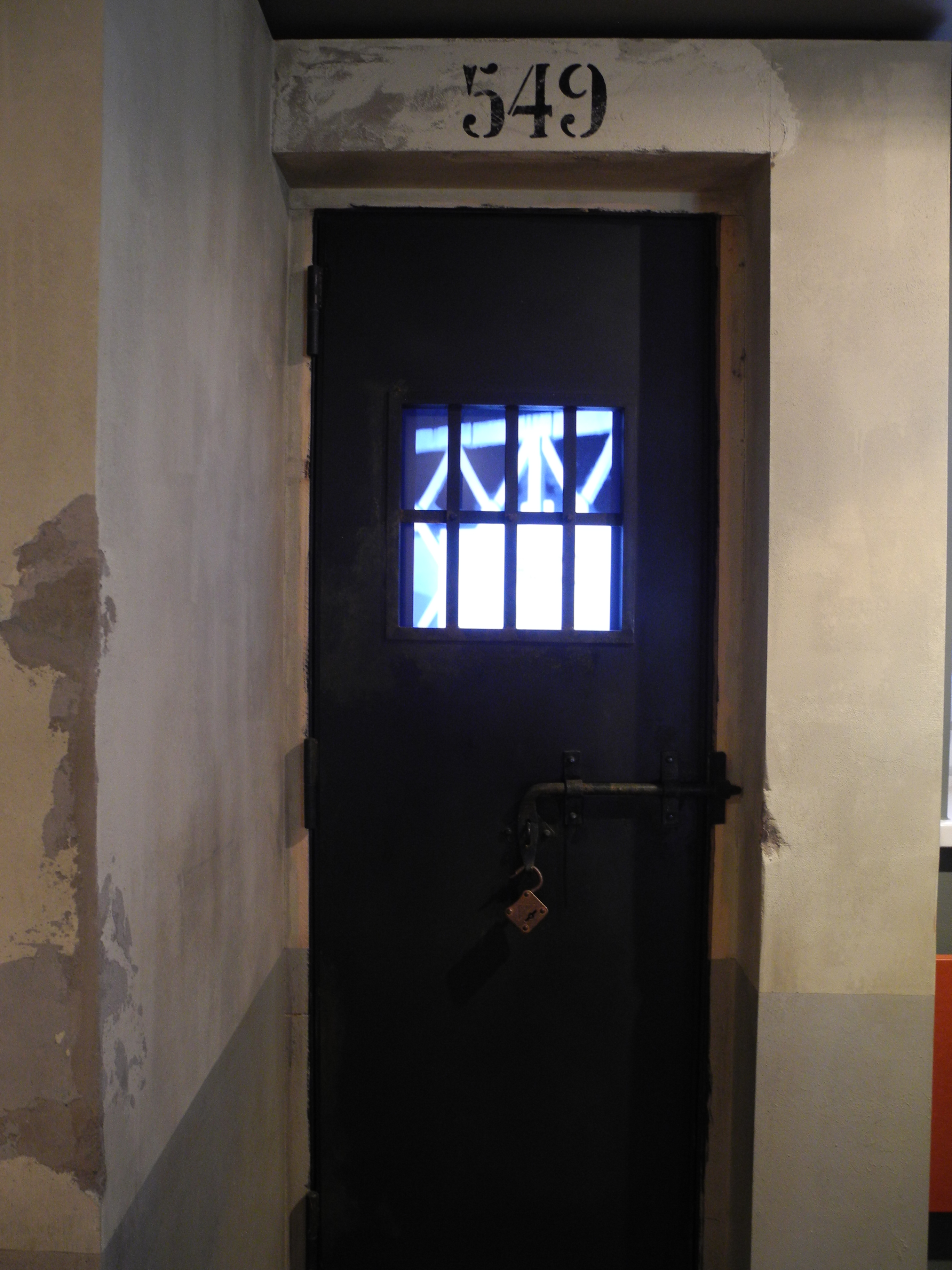 Porta della cella di un carcere che simboleggia il periodo di detenzione di Alcide De Gasperi